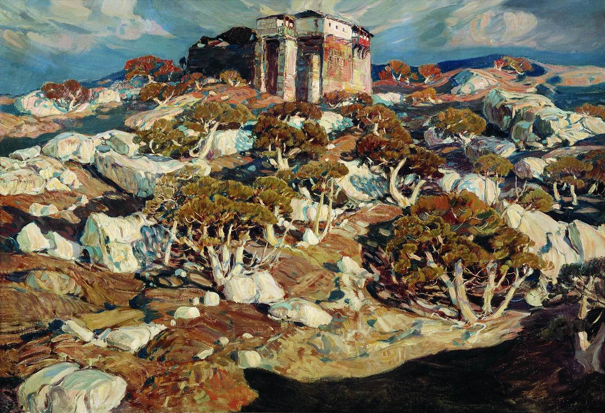 картины Константи́на Фёдоровича Богае́вского (1872 — 1943) — русского художника-пейзажиста